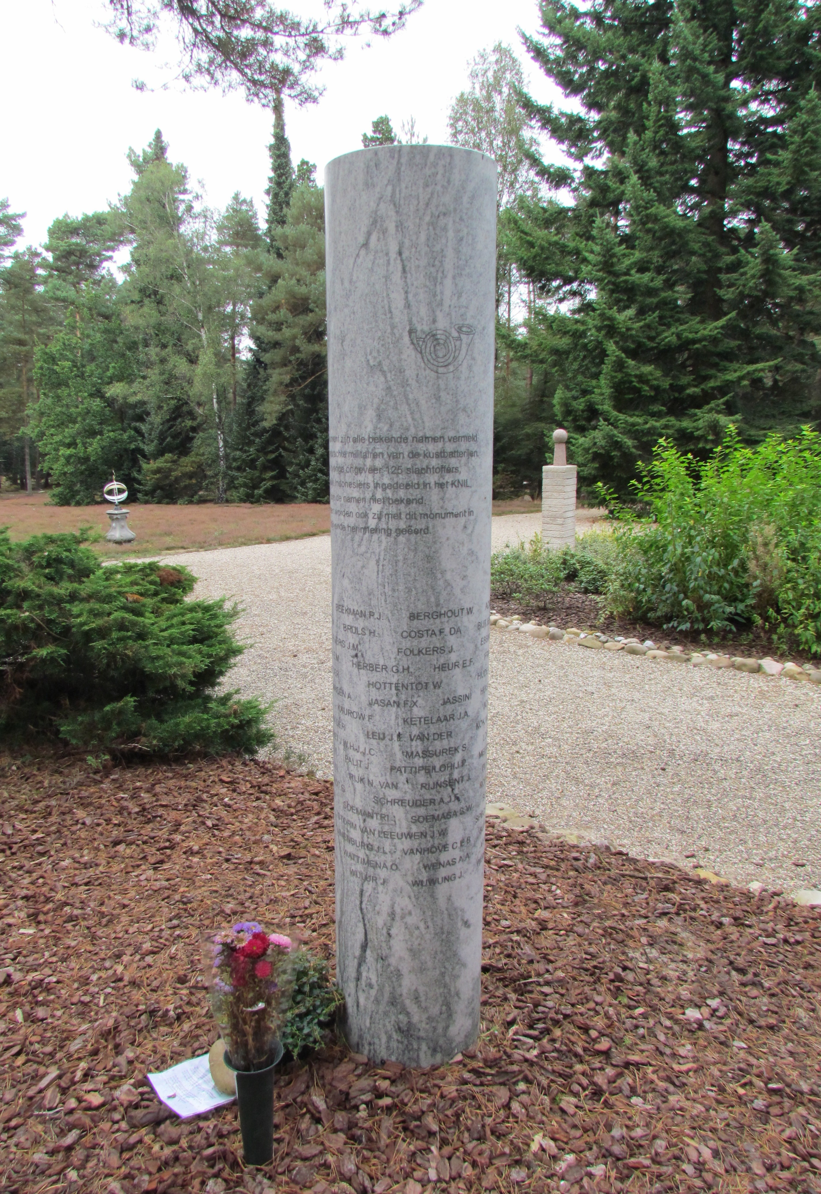 Monument op Ereveld Loenen voor de Slag bij Tarakan (januari 1942), onthuld op 19 januari 2012